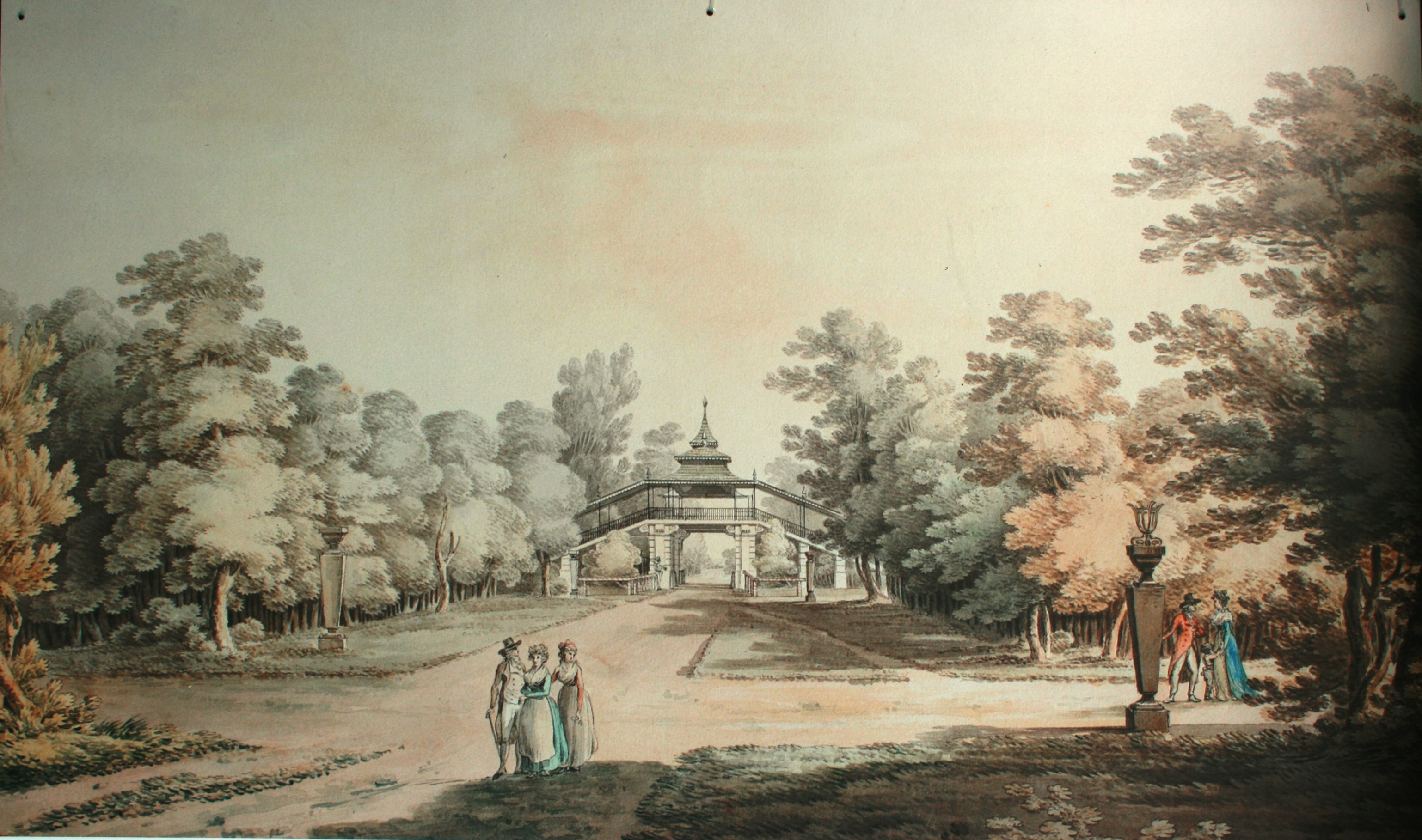 Akwarela Zygmunta Vogela: Widok na Bramę Chińską w Łazienkach z 1785 roku, obeznie w zbiorach Państwowego Muzeum Ermitażu w Petersburgu